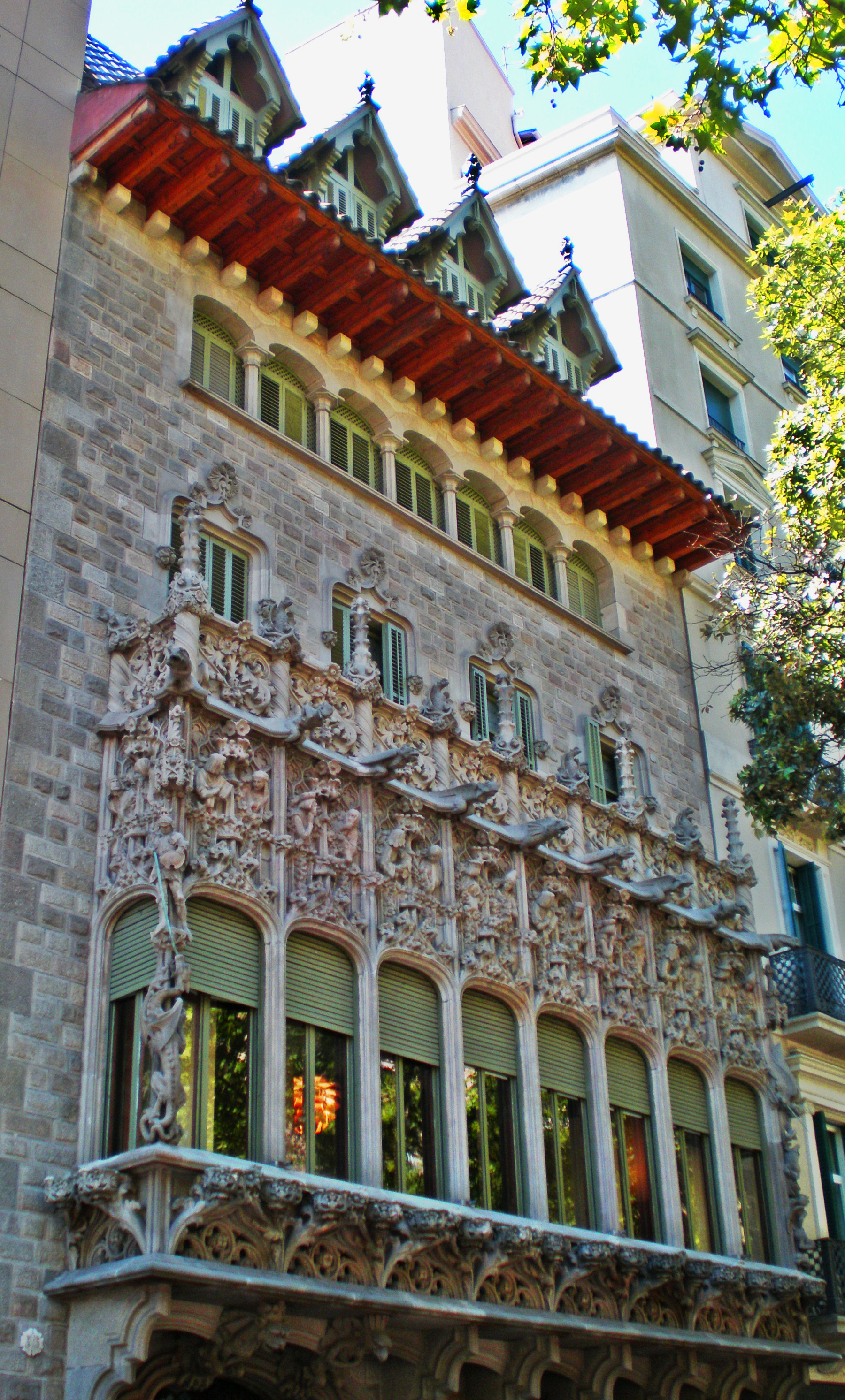 Palau del Baró de Quadras (Barcelona)